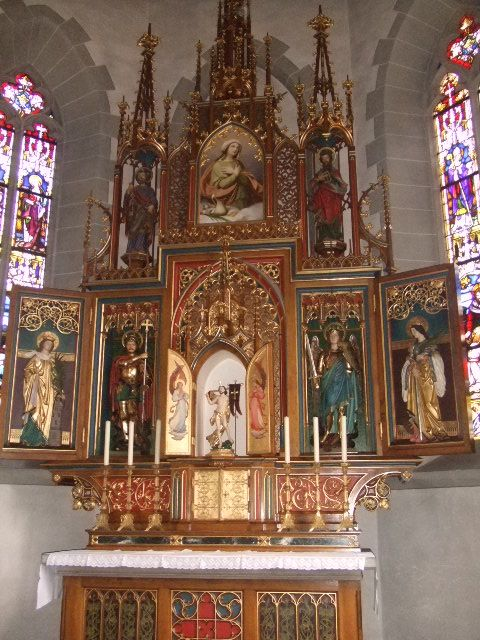 Pfarrkirche St. Verena, Roggenbeuren (Gemeinde Deggenhausertal, Bodenseekreis) Neugotischer Hochaltar